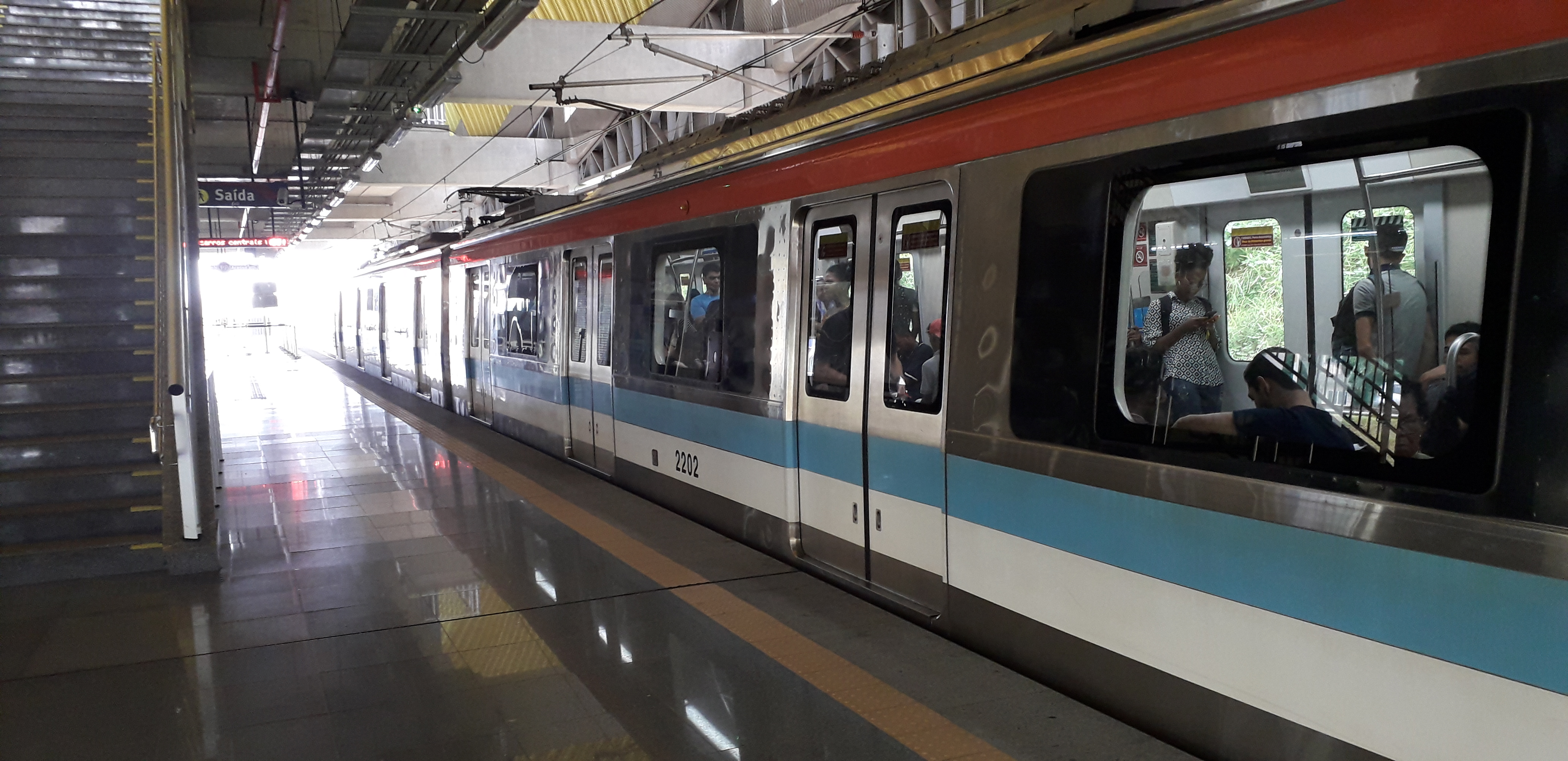 Imagens internas da Estação CAB do Sistema metroviário Salvador - Lauro de Freitas.